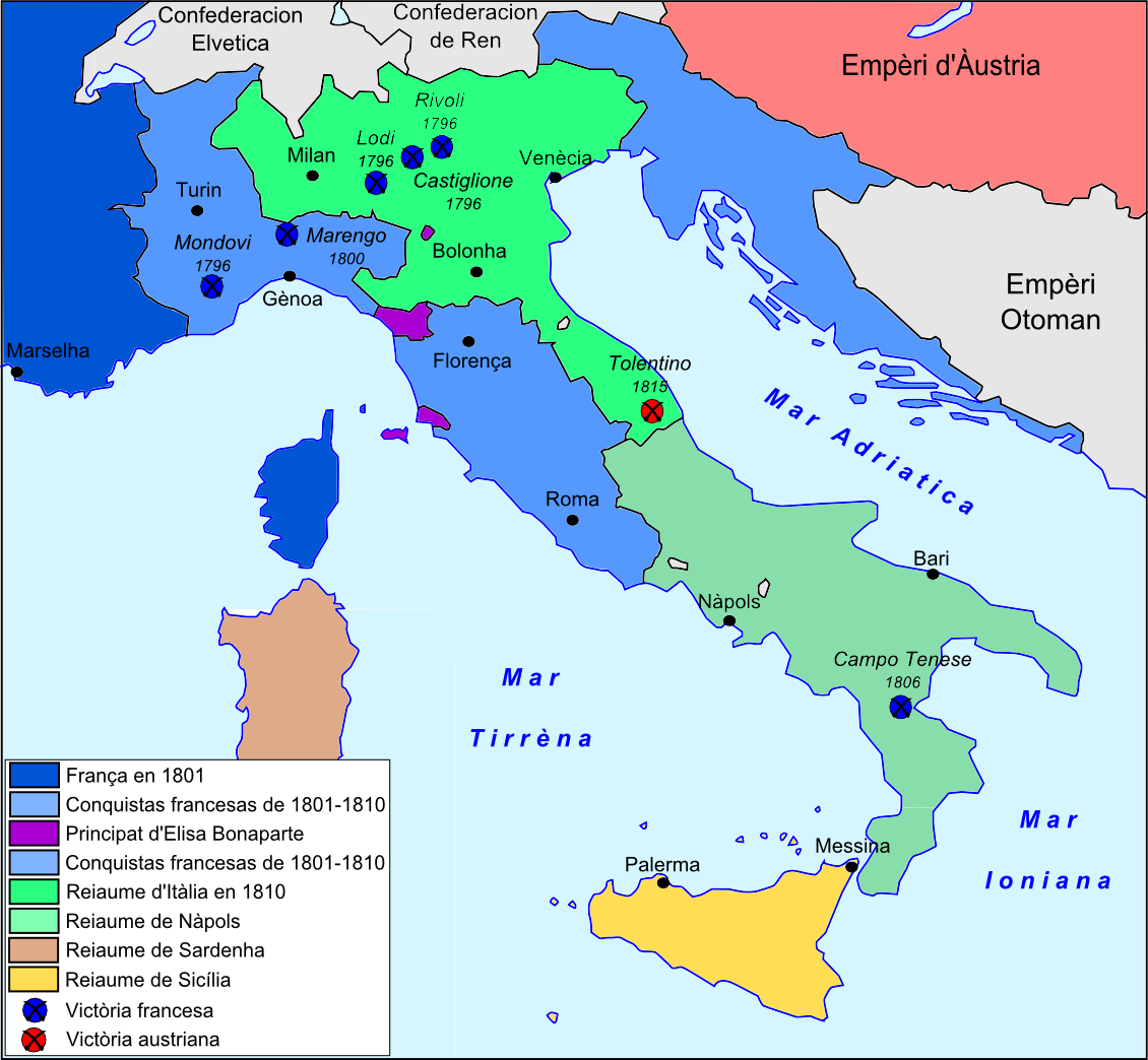 Itàlia durant lei guèrras napoleonencas.